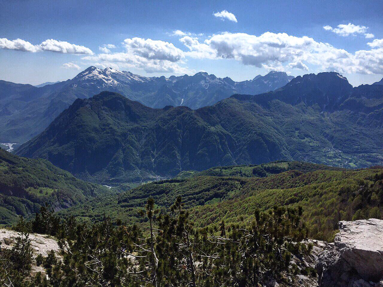 Lugina e Valbones, Tropoje